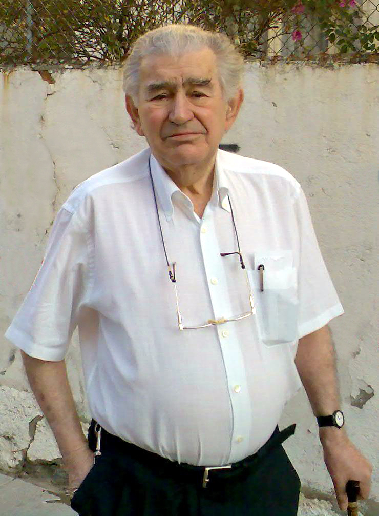 Antonio Gamoneda en León, agosto de 2007